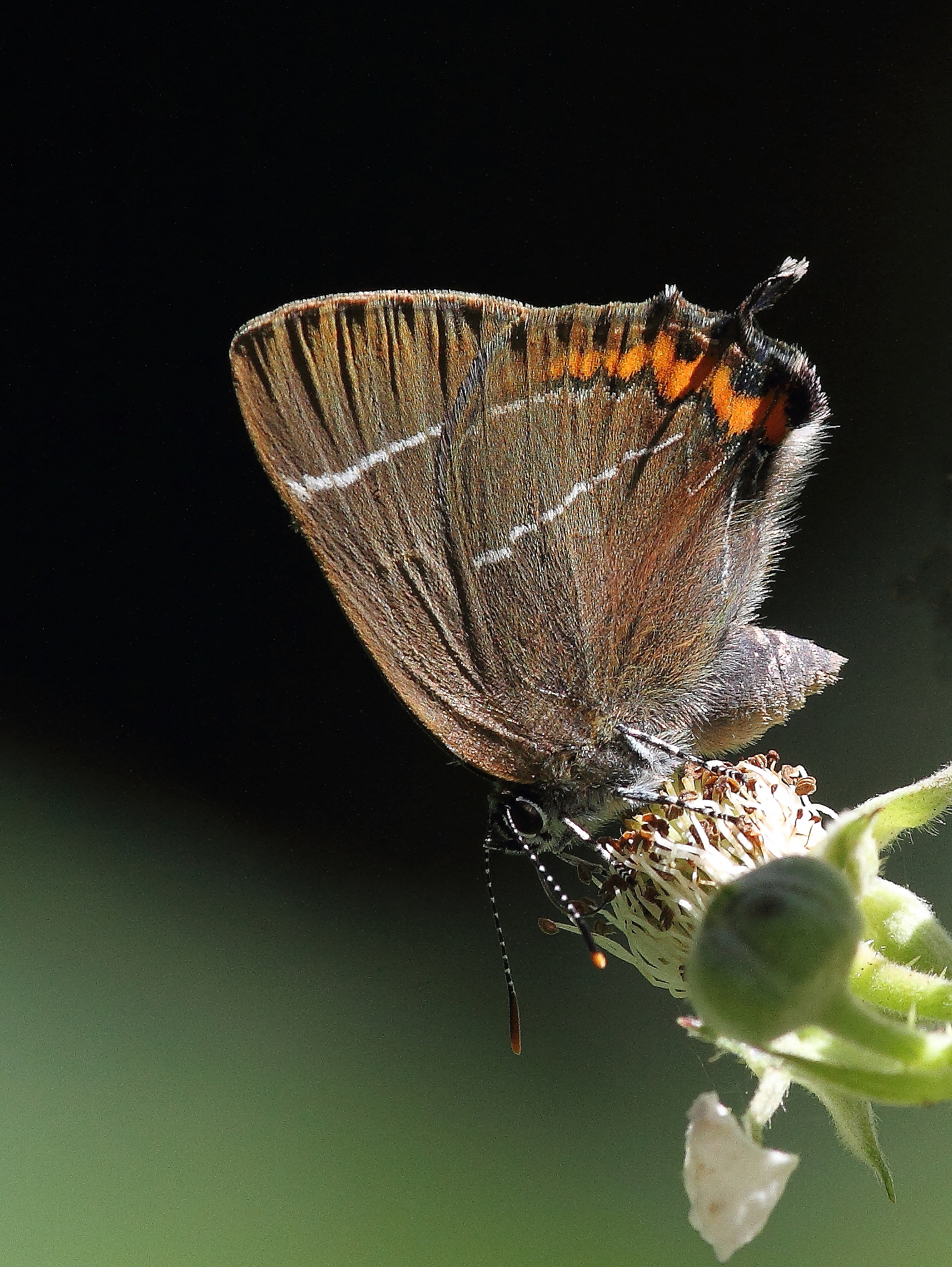 Tynnais y llun yn Pool Park, Rhuthun